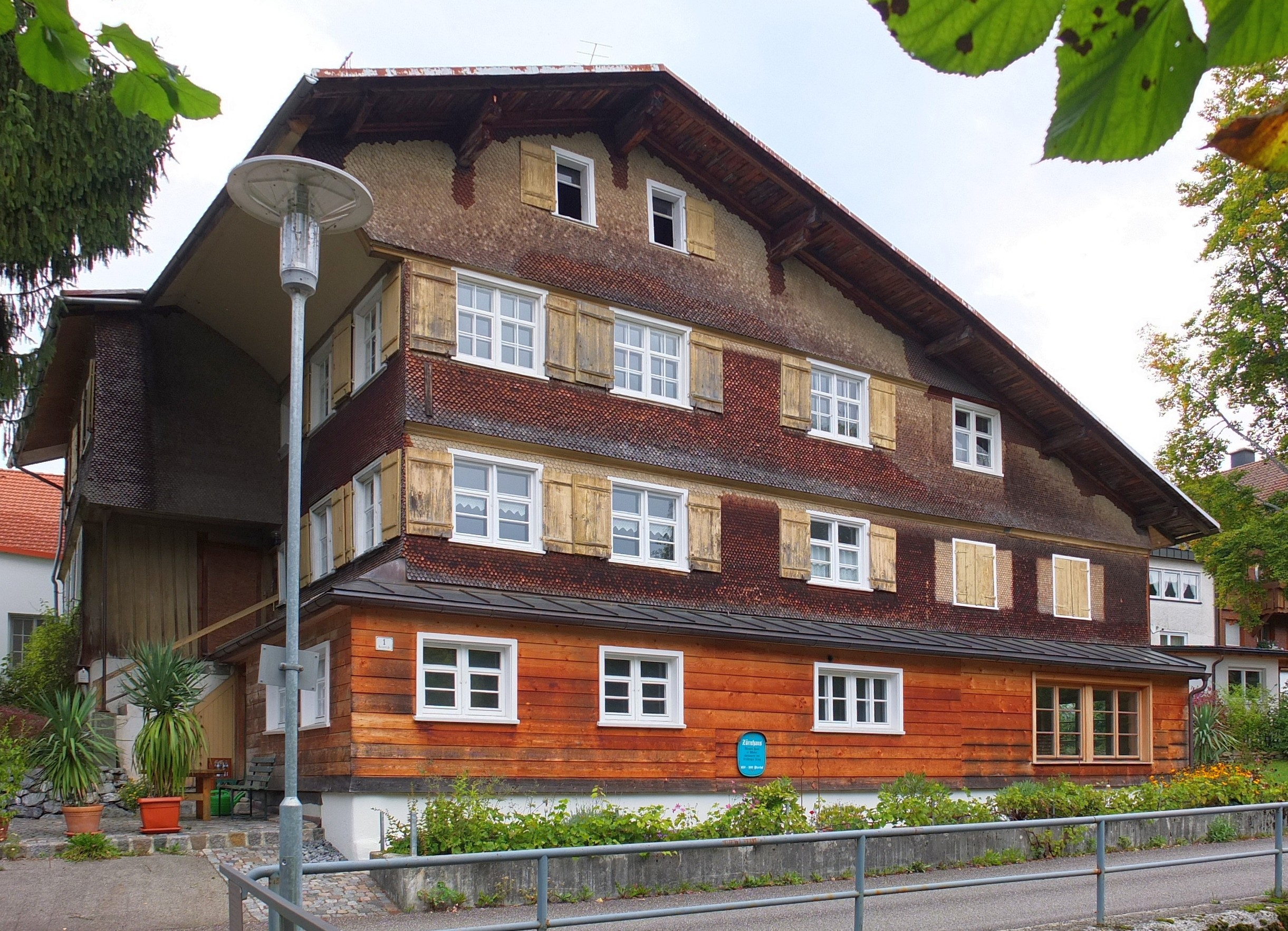 ehem. Pfarrhaus, Hausbachstraße 1, in Weiler im Allgäu (Weiler-Simmerberg, Bayern, Deutschland)This is a photograph of an architectural monument.